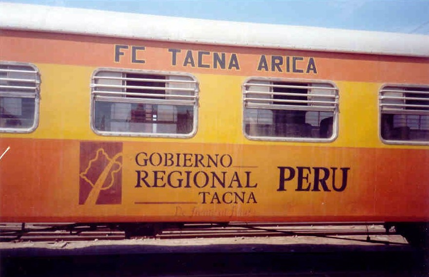 Vagon FFCC Tacna Arica